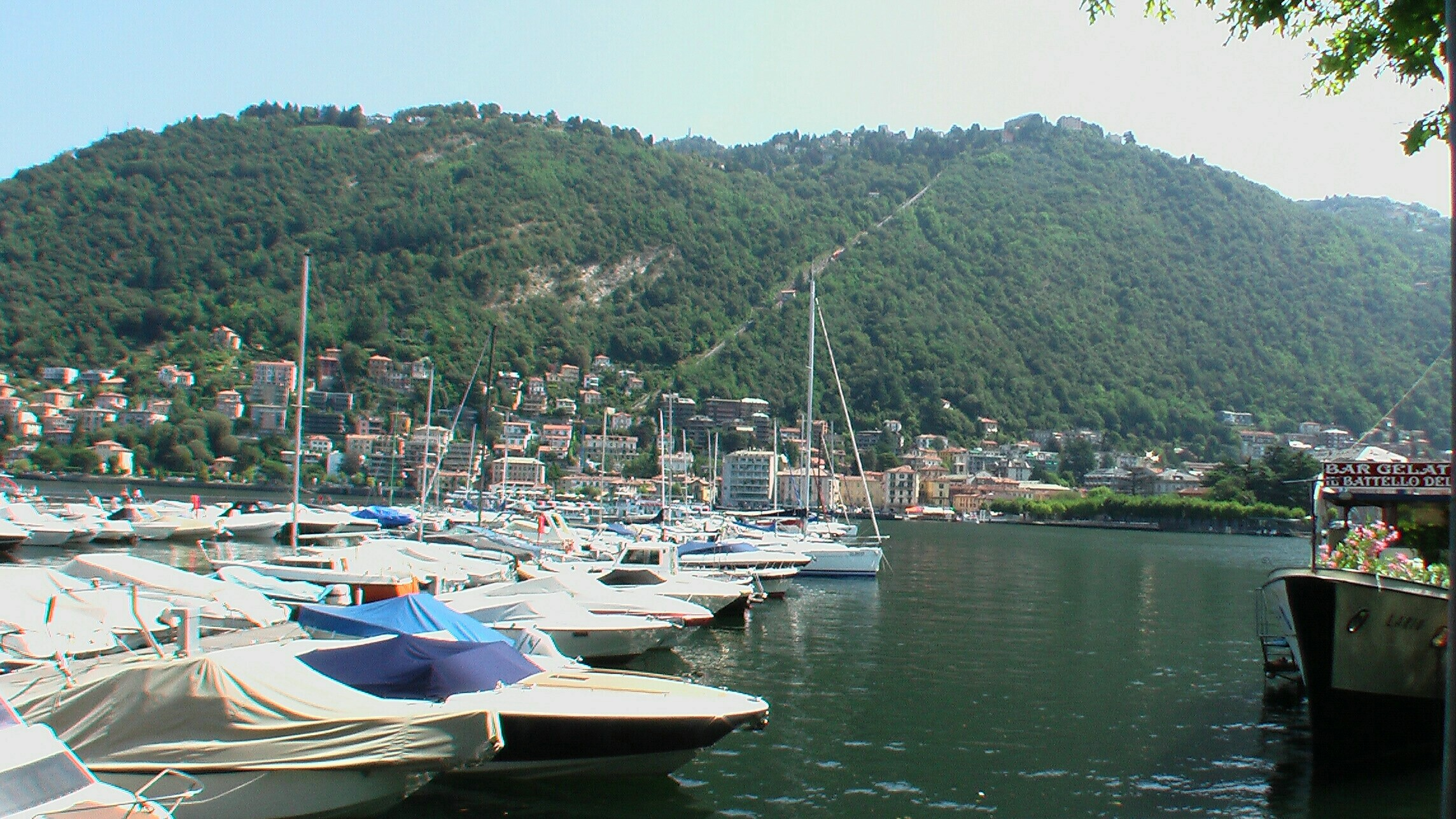 ComoYachthafen